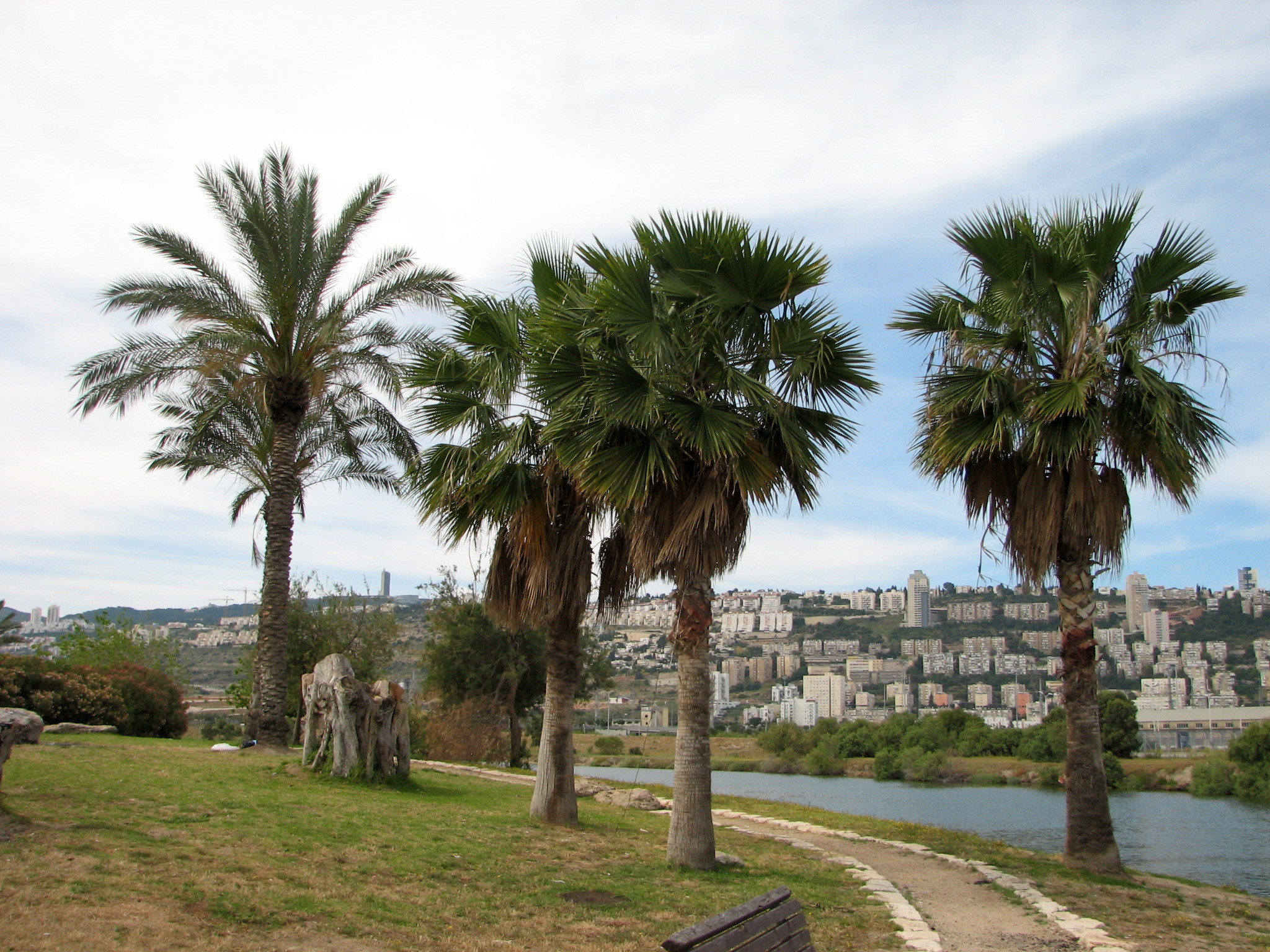 Nesher The Kishon River is a river in Israel that flows into the Mediterranean Sea at the city of Haifa.His length is 70 km. נחל קישון זורם מג'נין שבשומרון, לאורך כ-70 ק"מ, דרך עמק יזרעאל, מפער הקישון (המעבר הצר בין הכרמל לגבעות אלונים שפרעם) ועמק זבולון, עד יציאתו לים במפרץ חיפה. בשפך הנחל נמצא נמל הקישון. שטח אגן הניקוז שלו הוא השני בגודלו מבין נחלי החוף, כ-1,110 קמ"ר ולאורך חלק ניכר מאפיקו זרימתו איתנה. הנחל סבל מזיהום רב במיוחד באפיקו התחתון. בתחילת שנות ה2000 עבר הנחל שיקום באמצעות רשות נחל קישון והדגה והעופות חזרו לנחל פארק הקישון, מבט לכוון דרום מזרח. משמאל בתי העיר נשר מימין שכונת נווה שאנן בחיפה